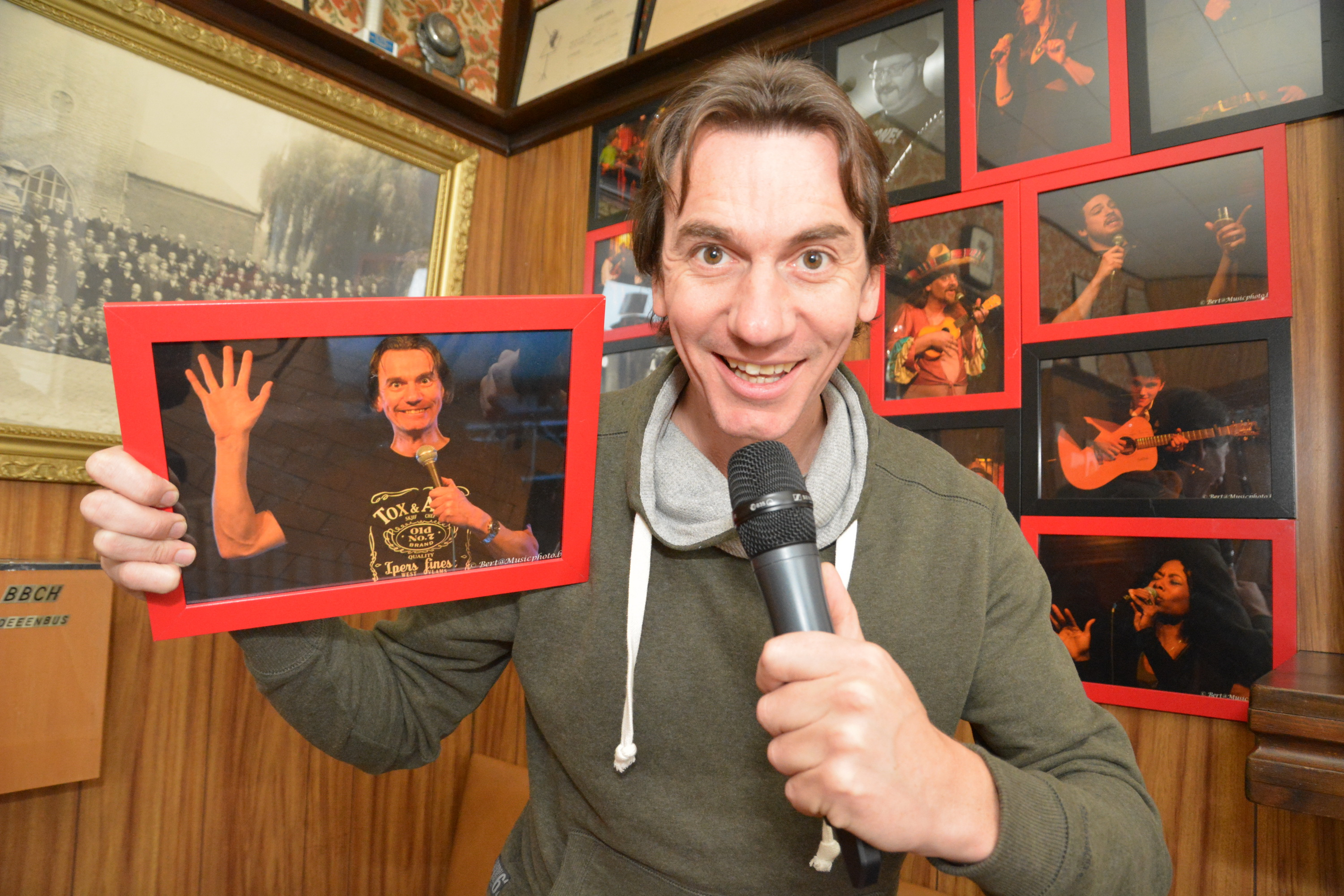 Bert Gabriels in Theatercafé & Comedyclub Malvine te Heffen (Mechelen)